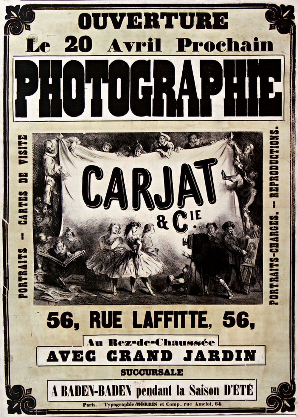 Affiche de Louis Émile Benassit (1833-1902) pour l'ouverture en 1861 du studio de photographie d’Étienne Carjet. Bibliothèque nationale de France, ENT DO-1 (BENASSIT,Emile)-ROUL.